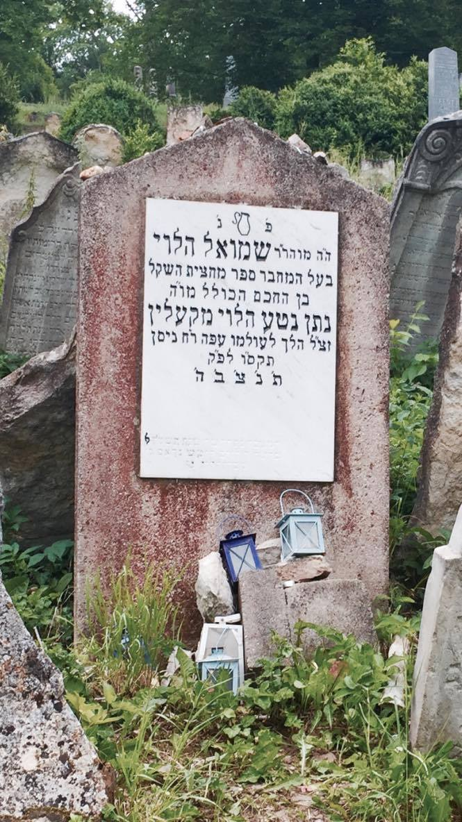 Maceva Samuel Haleviho Kolina na židovském hřbitově v Boskovicích